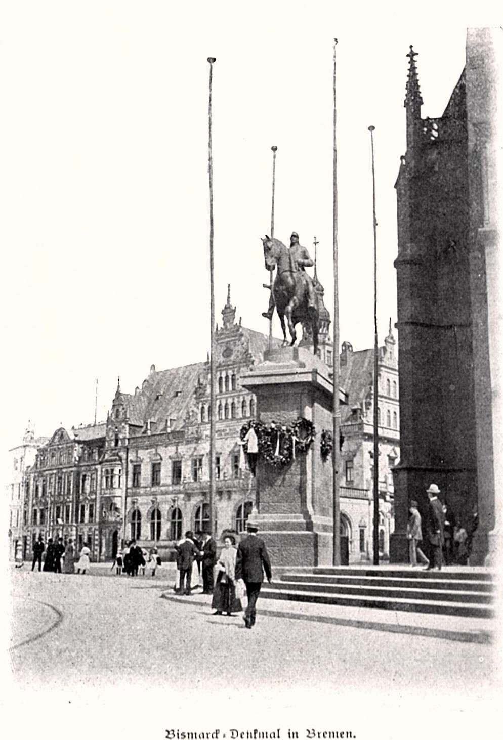 Scan aus Foliant:"Bismarck-Denkmal für das Deutsche Volk"- Vaterländischer Verlag, C.A. Weller, Berlin 1915